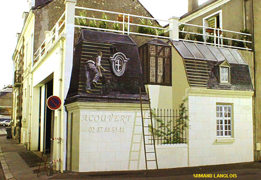 Fresque de la place du docteur Fournier à Tours réalisée par Armand Langlois